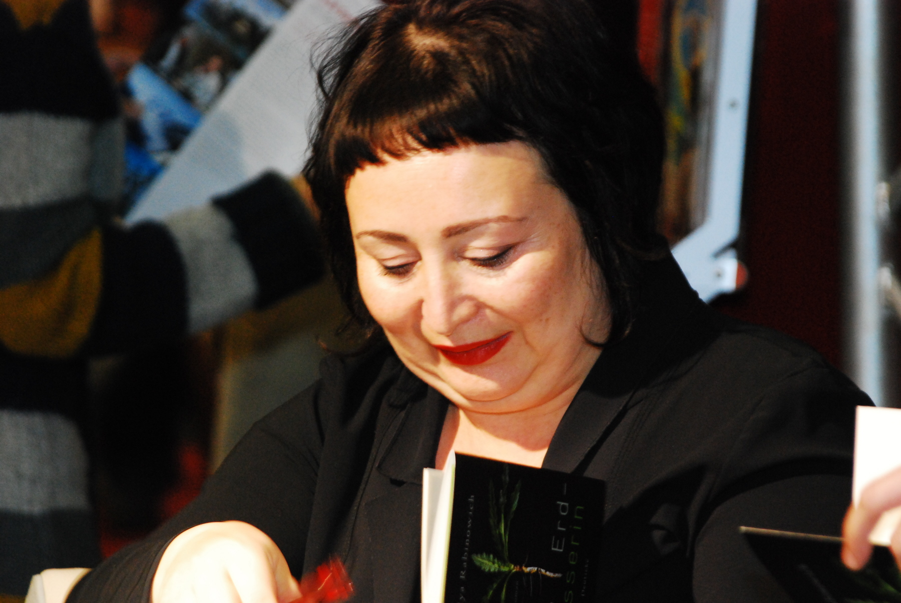 Julya Rabinowich, fotografiert auf der Buchmesse Buch Wien 12 auf dem Wiener Messegelände